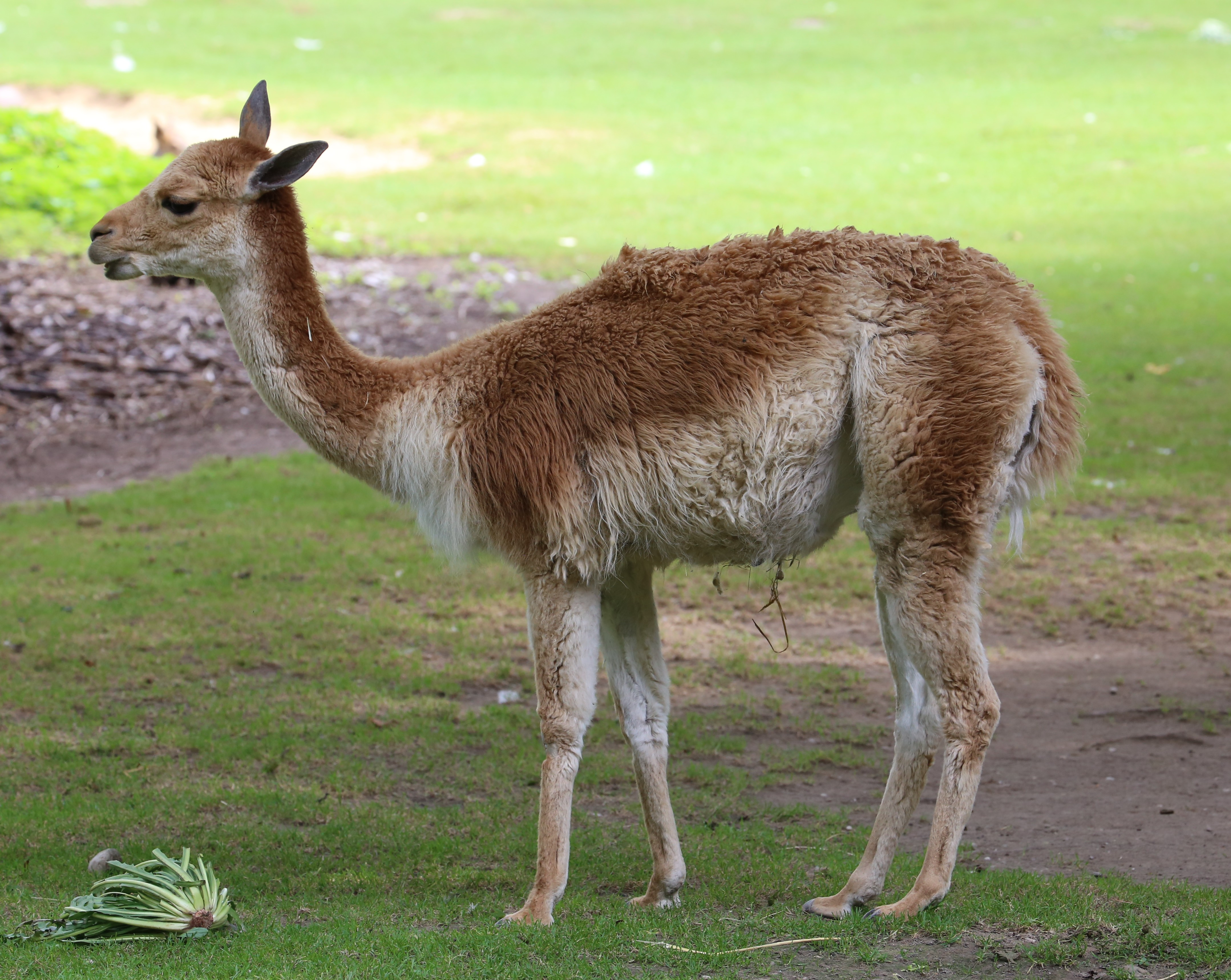 Vikunja (Vicugna vicugna), Tierpark Hellabrunn, München